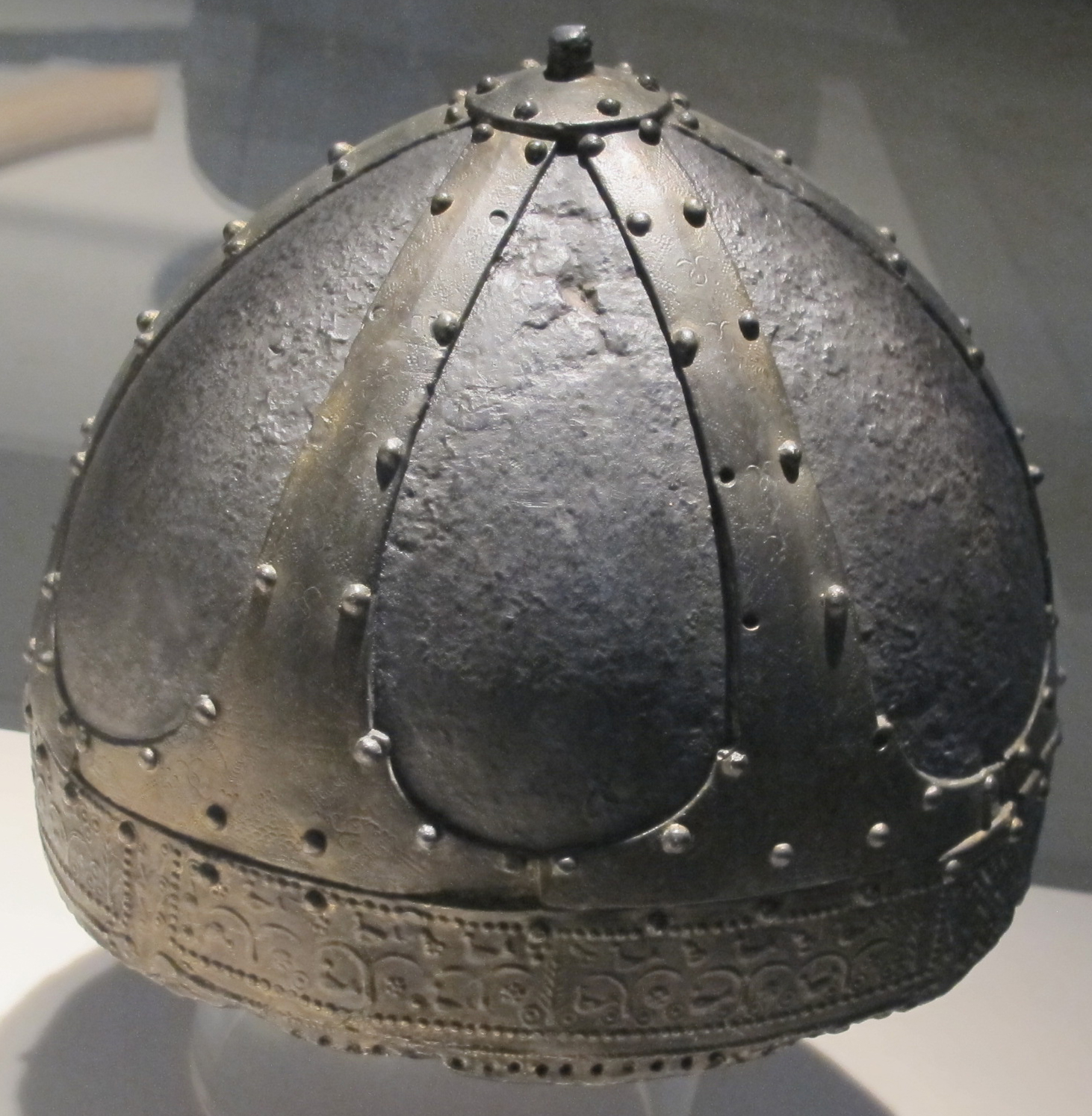 Elmo franco